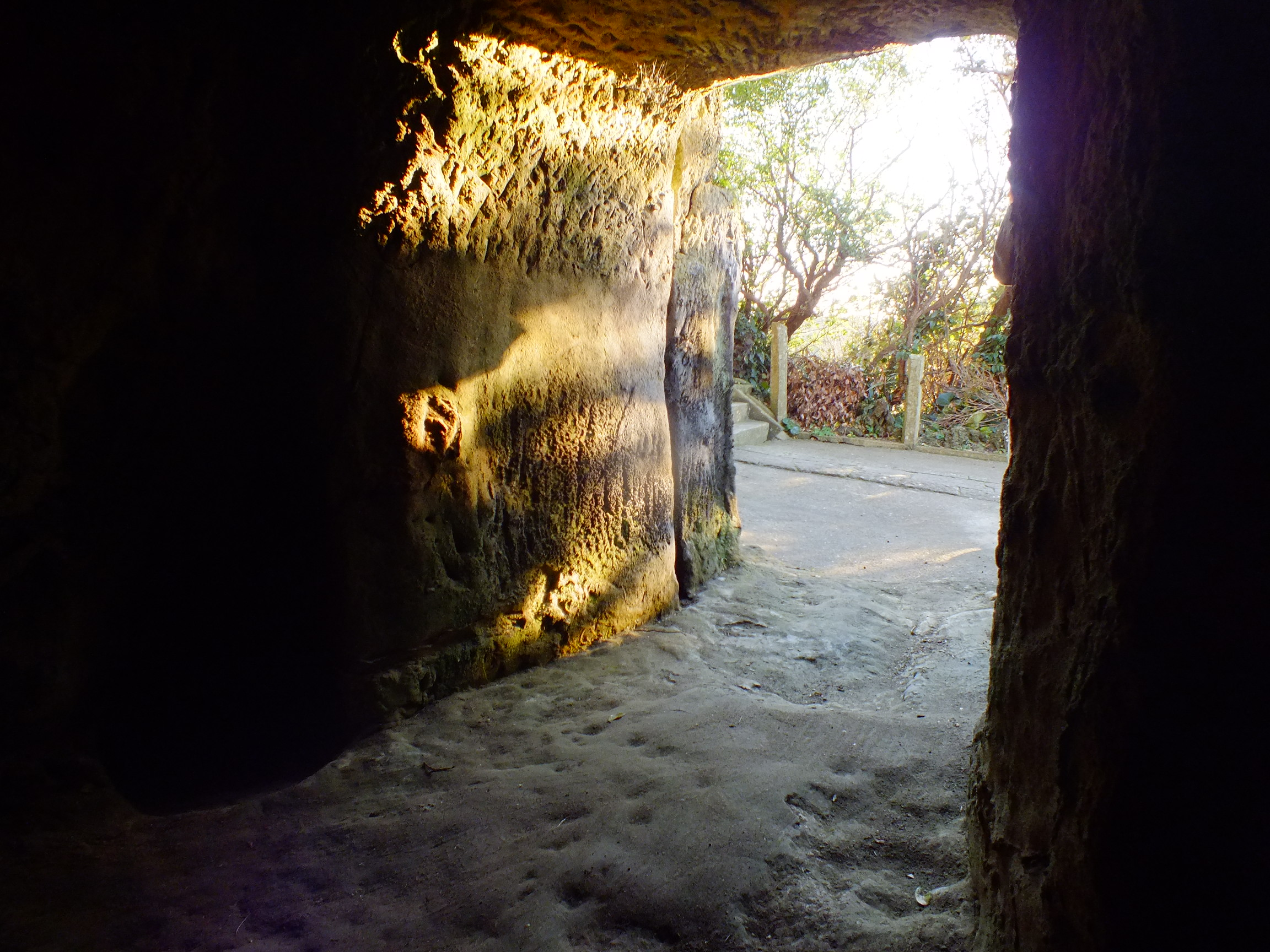 2013-11-30 Kohama-Hachiman jinja 八幡岬・小浜八幡神社より